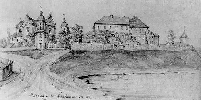 Костьол Святого Йосипа і залишки Новозаславського замку